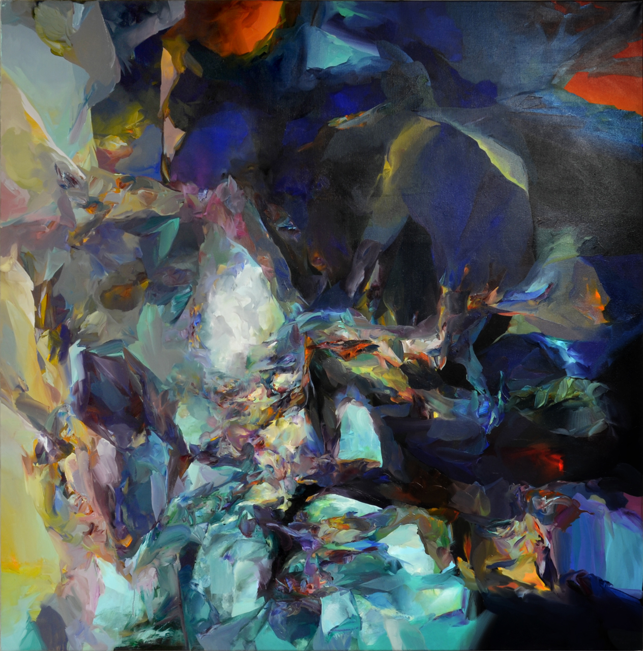 Pavel Vašíček, Múzy zmizely (2016), olej na plátně, 130 x 130 cm